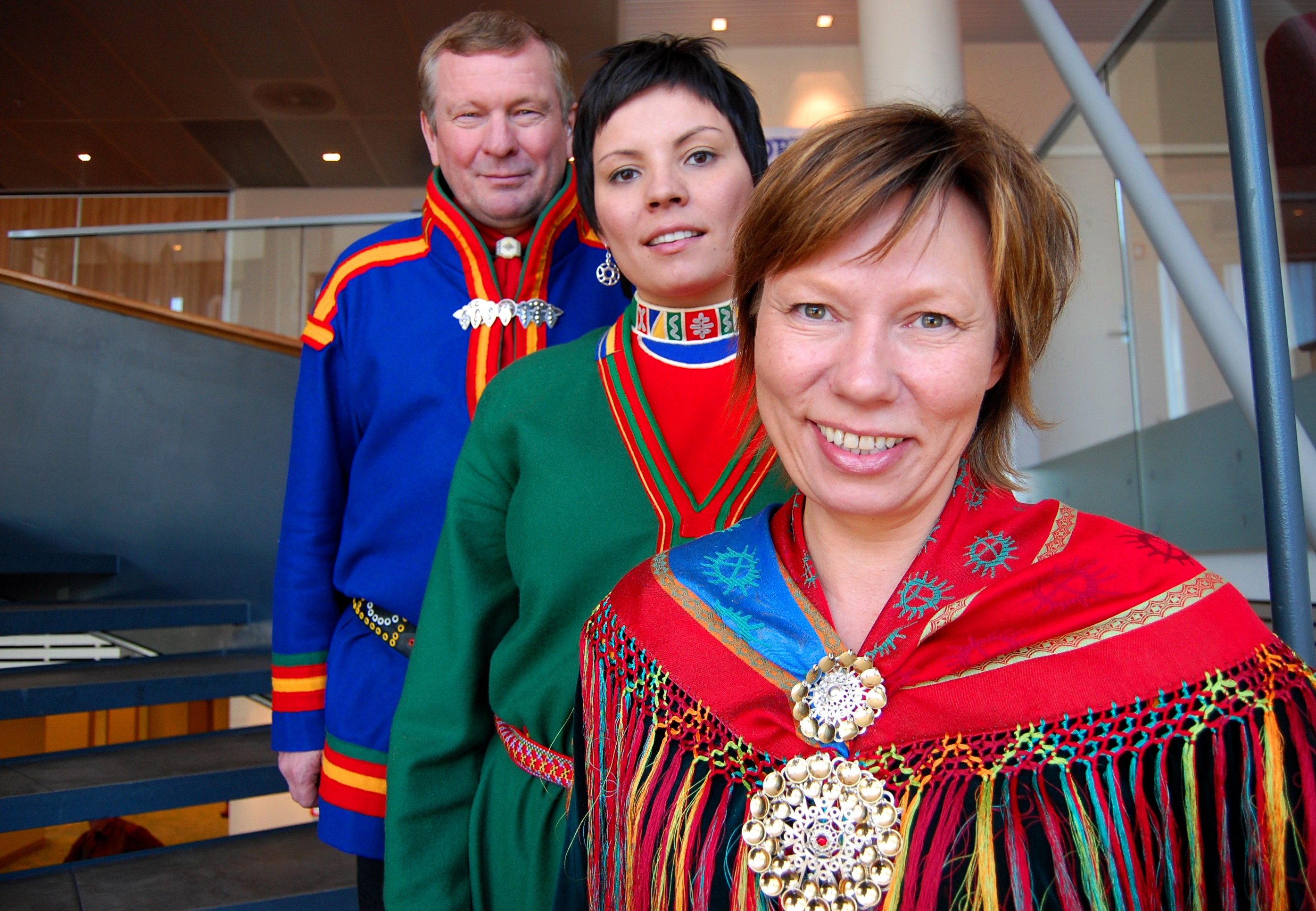 De 3 første kandidatene på sametingsvalglista til Norske Samers Riksforbund (NSR) i Vesthavet valgkrets: 1. kandidat Ann-Mari Thomassen fra Skånland, 2. kandidat Miriam Paulsen fra Tysfjord og 3. kandidat Åge Nordkild fra Vassdalen.